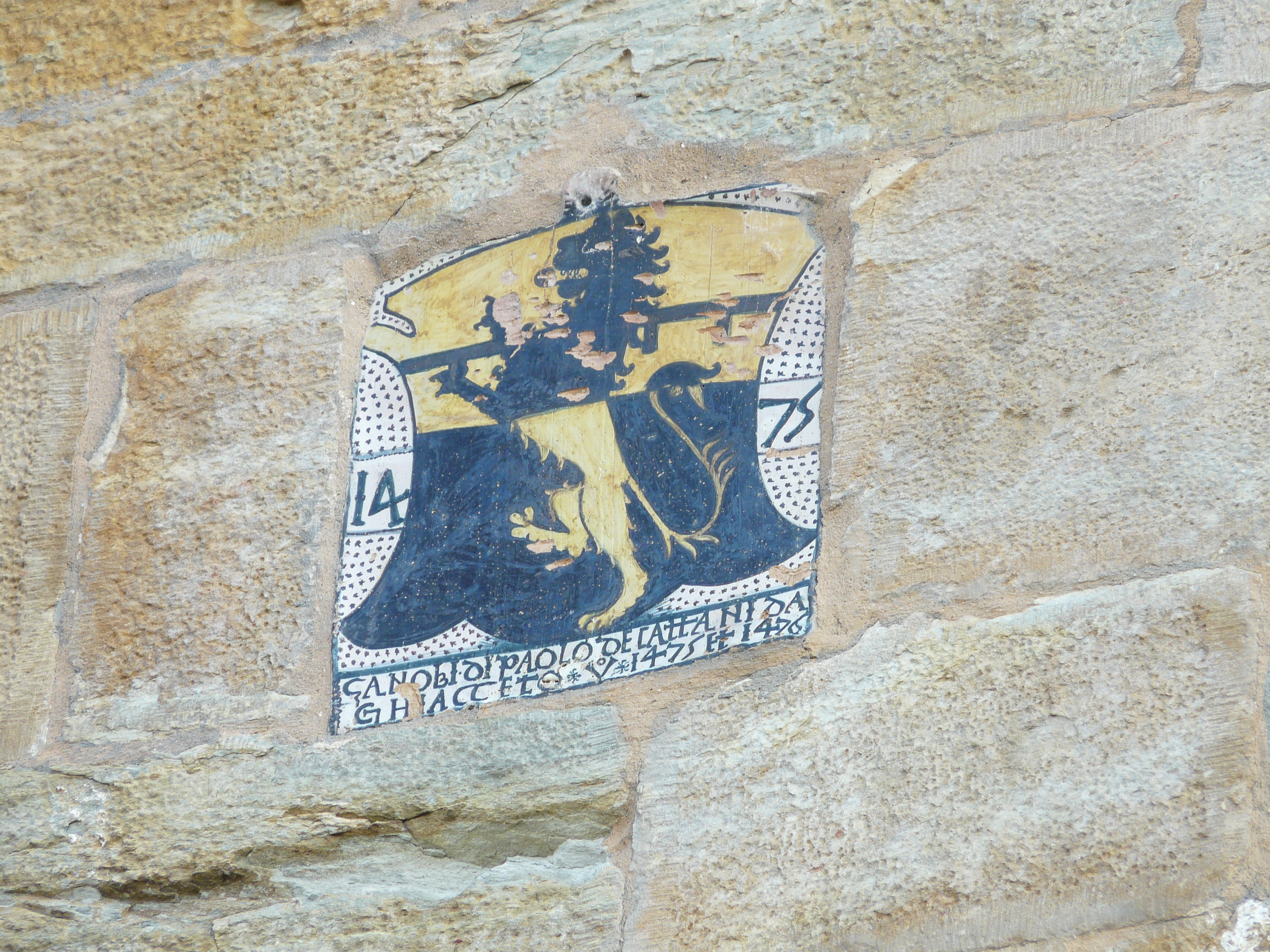 Palazzo Pretorio, Comune di Vicopisano, Toscana, Italia